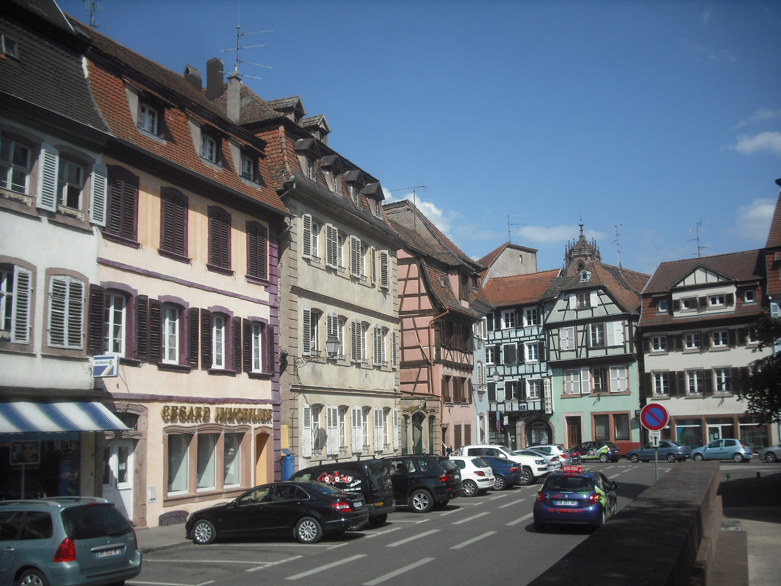 Place du Marché aux Pots, Sélestat, Bas-Rhin, France.